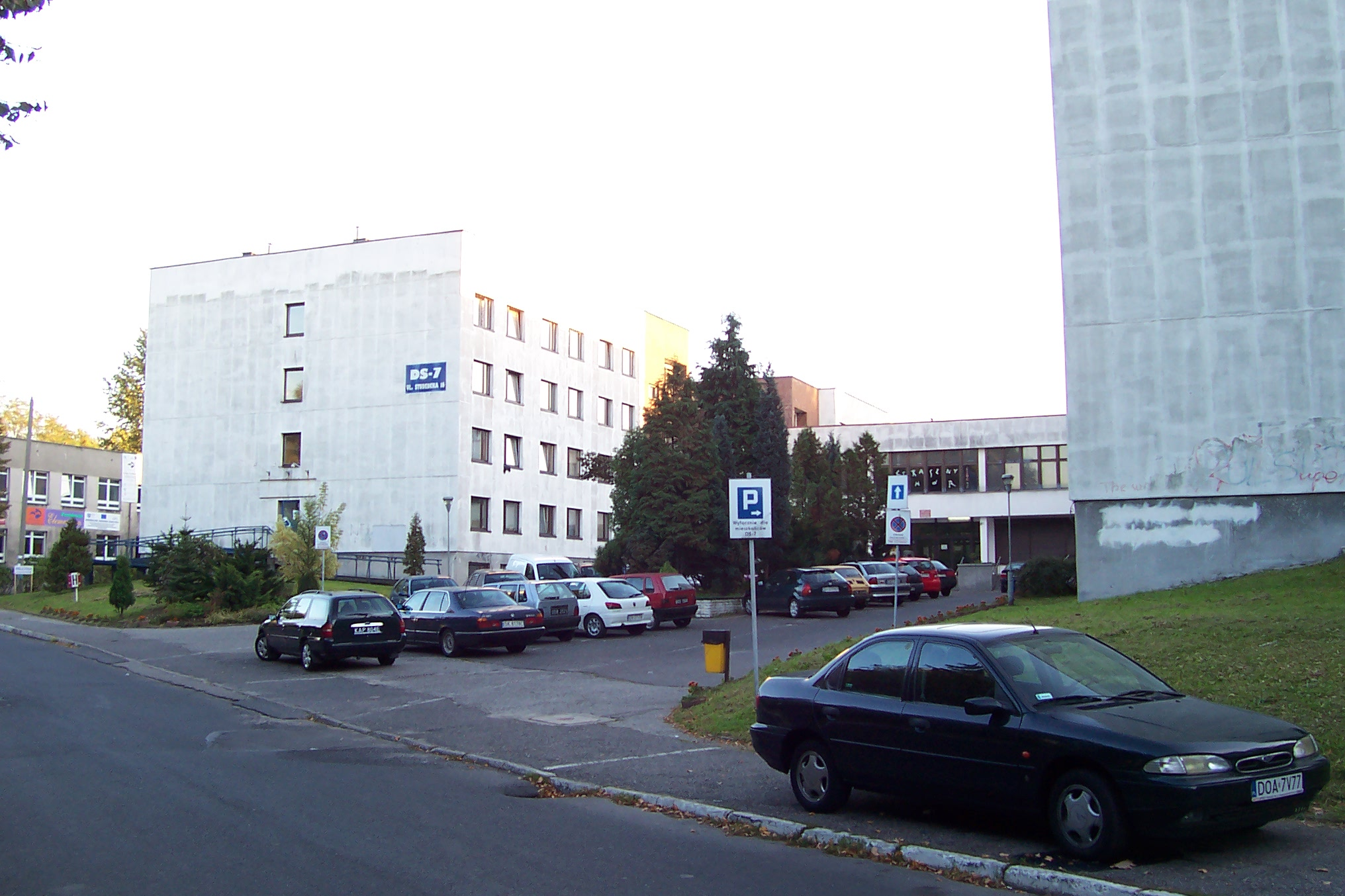 Katowice-Ligota Dom Studencki nr 7